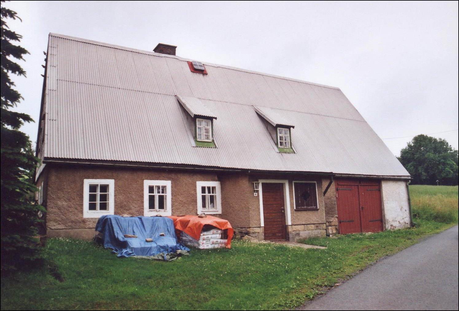 Gottgetreu (Geising): typisches Erzgebirgshaus (Einhaus)